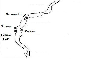 Situación de las fortalezas egipcias levantadas por la Dinastía XII en la zona fronteriza de la segunda catarata del Nilo.